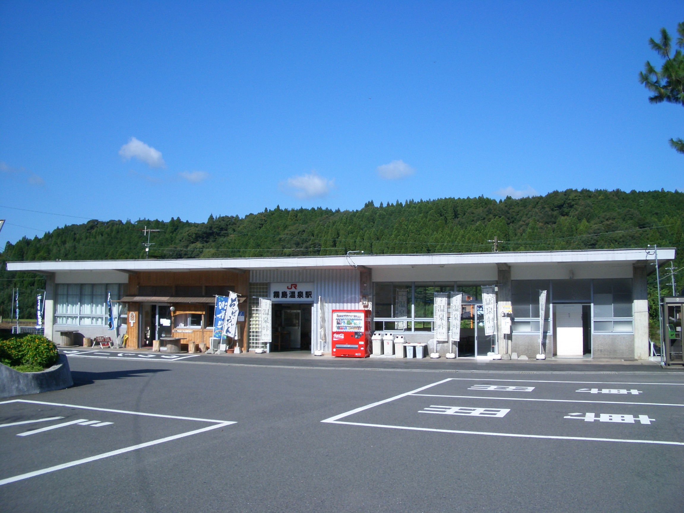 肥薩線の霧島温泉駅駅舎